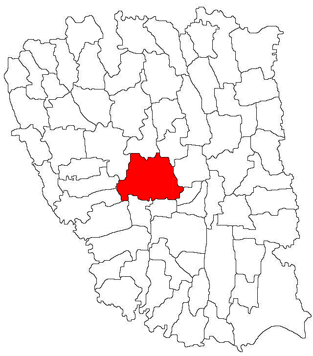 Categorie:Hărţi ale judeţului Galaţi